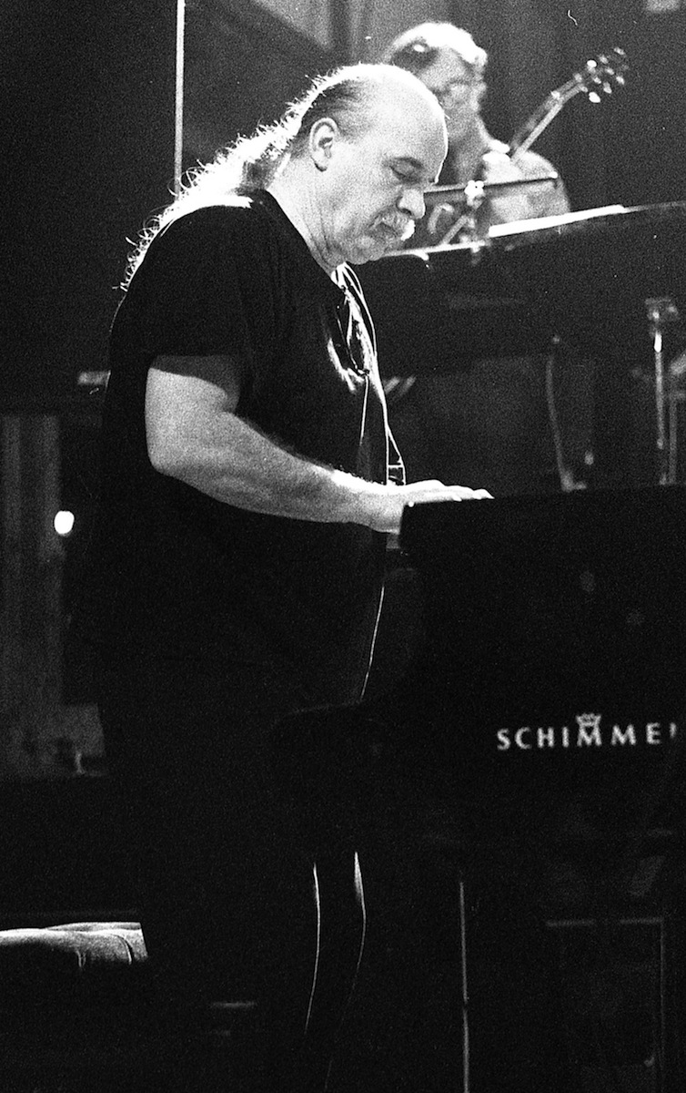 Wolfgang Dauner (United Jazz + Rock Ensemble), 23.11.1992, Braunschweig, Jolly Joker